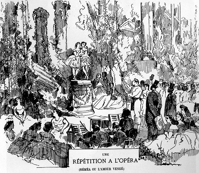 Rehearsal at the Paris Opera (Nemea or The Avenged Love)